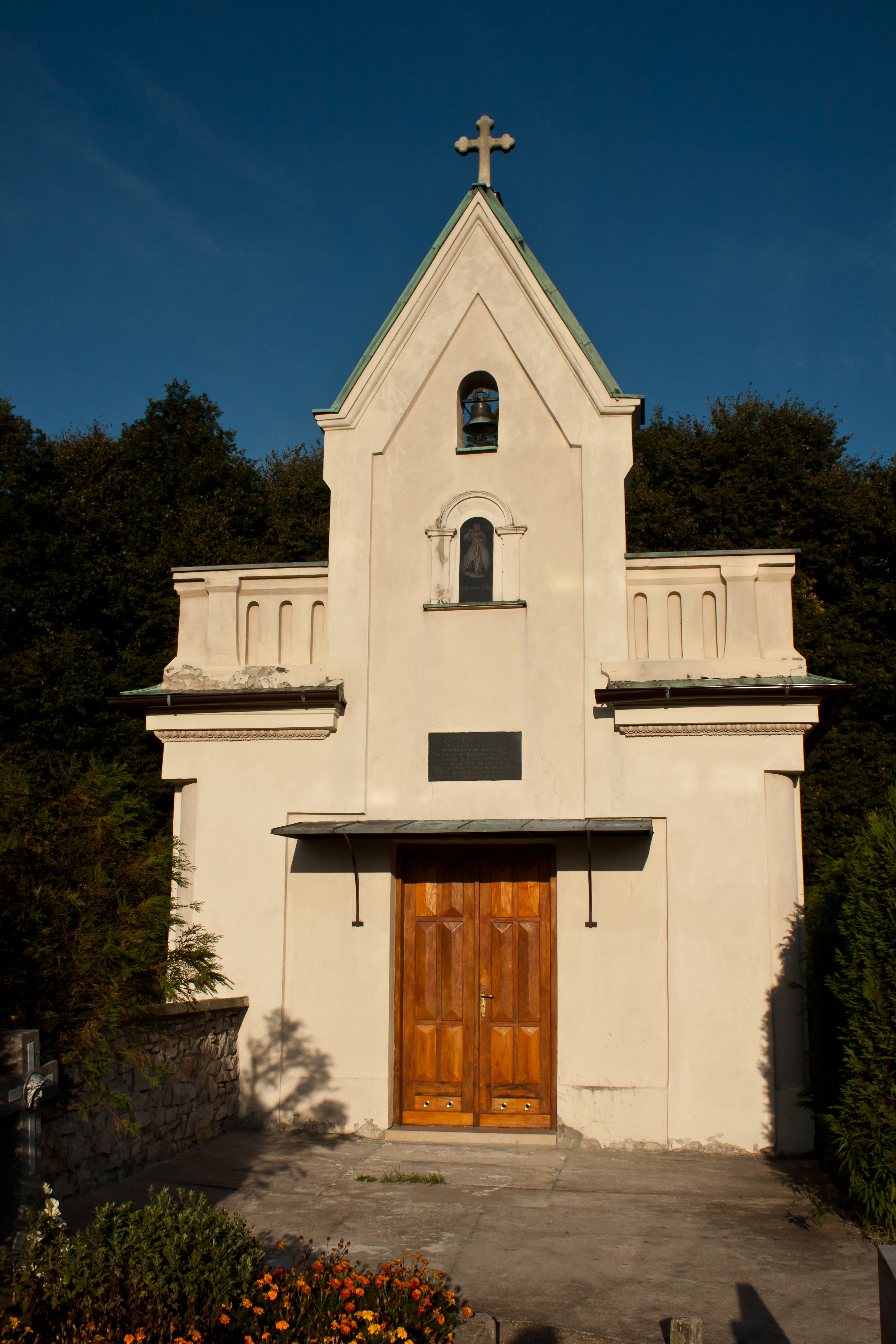 Bobrek - kaplica grobowa przy kościele par. p.w. Św.Trójcy